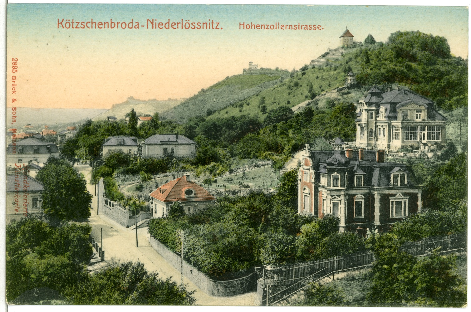 Kötzschenbroda; Niederlößnitz, Hohenzollernstraße This postcard is from publisher Brück & Sohn in Meißen ( postcard has a unique number 02895 and is available in a higher resolution at the publisher. This images was uploaded in a cooperation project between Wikipedians and the publisher.